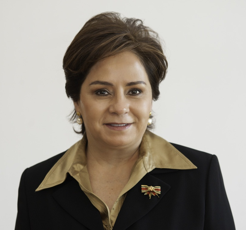 Embajadora Patricia Espinosa Cantellano- Embajada de México en Alemania